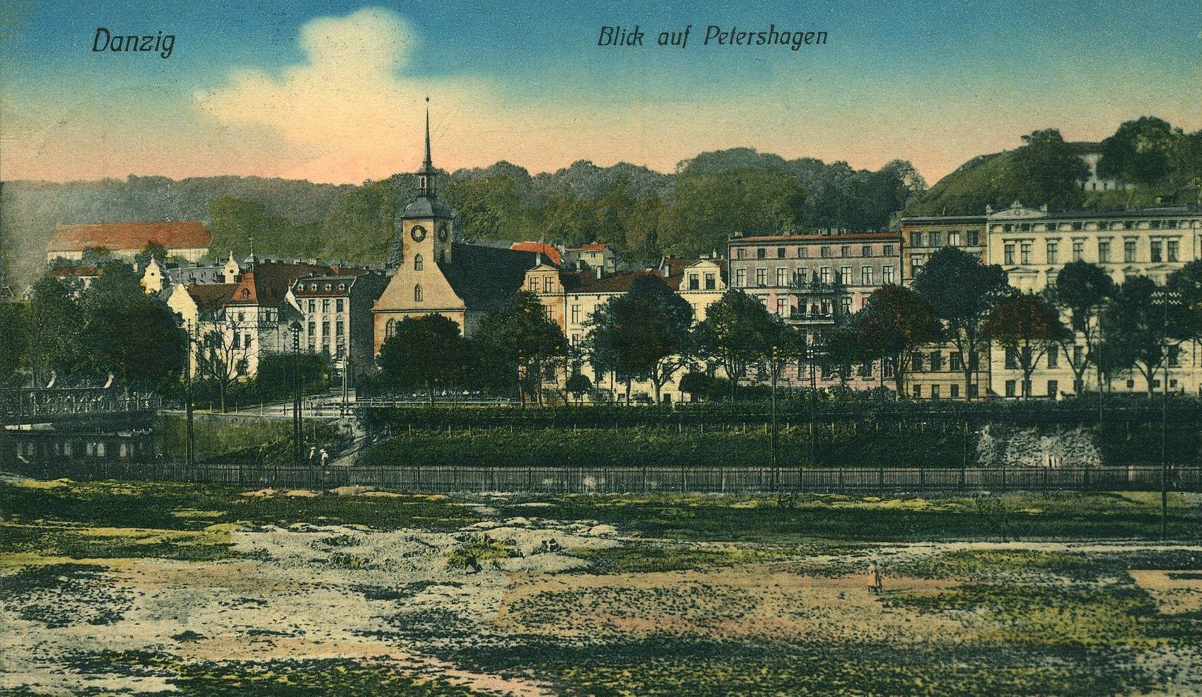 Widok gdańskiego Zaroślaka, około 1910 r.